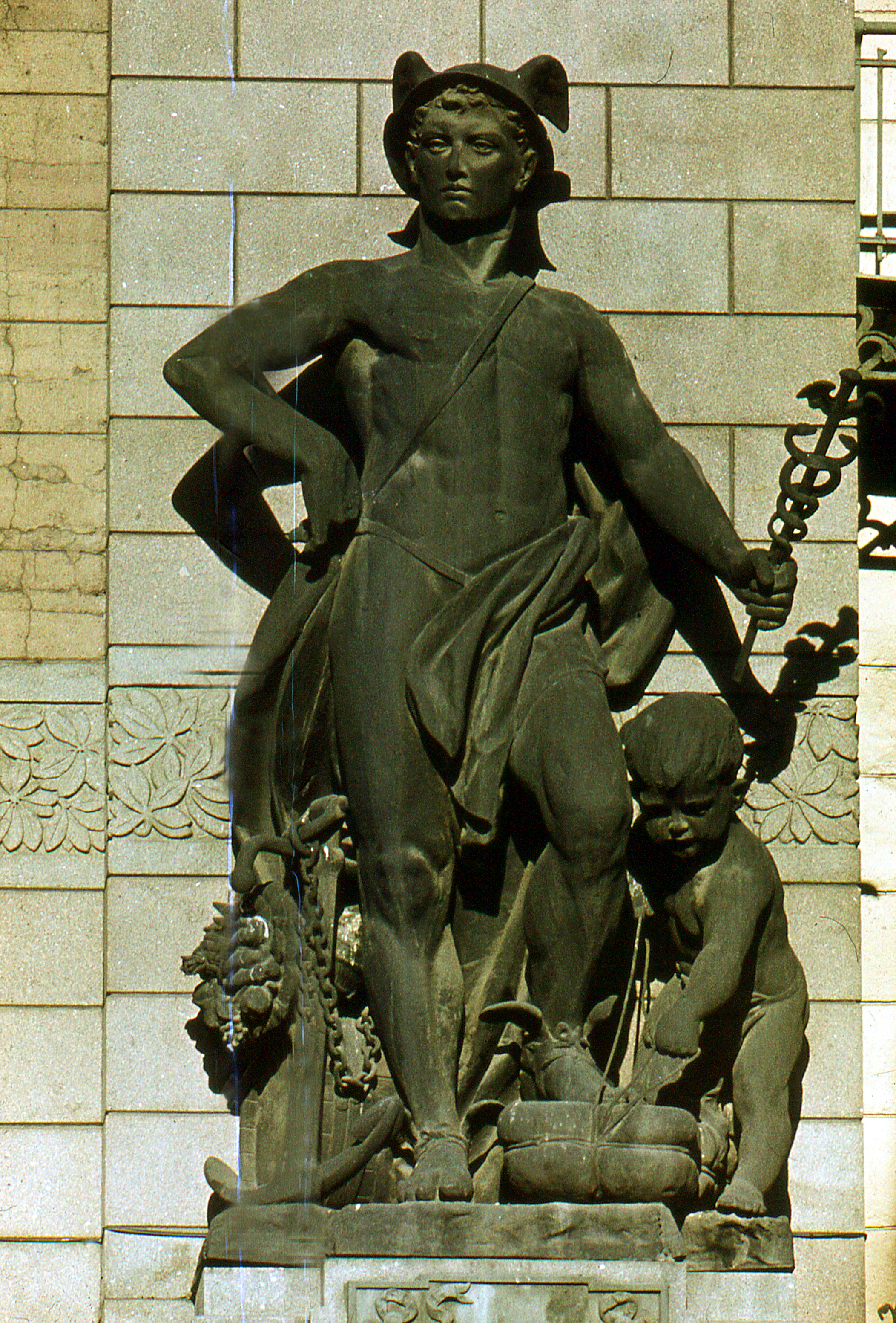 Аллегория торговли.Фигура на Невском пр.